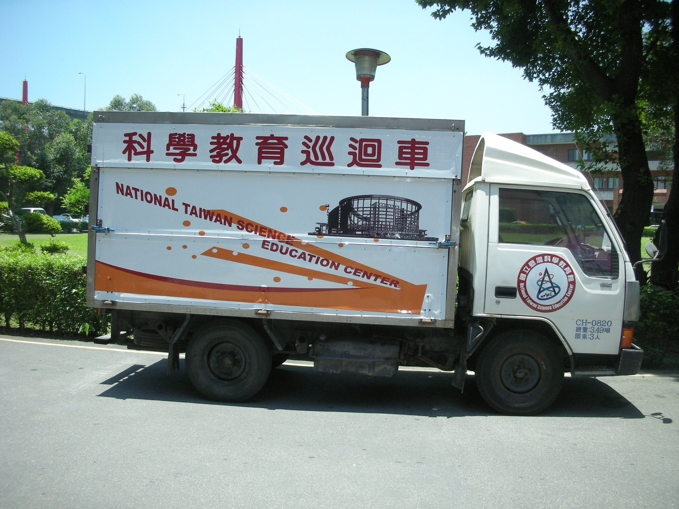 中文（台灣）: 國立臺灣科學教育館中華堅達科學教育巡迴車CH-0820停在救國團劍潭海外青年活動中心。